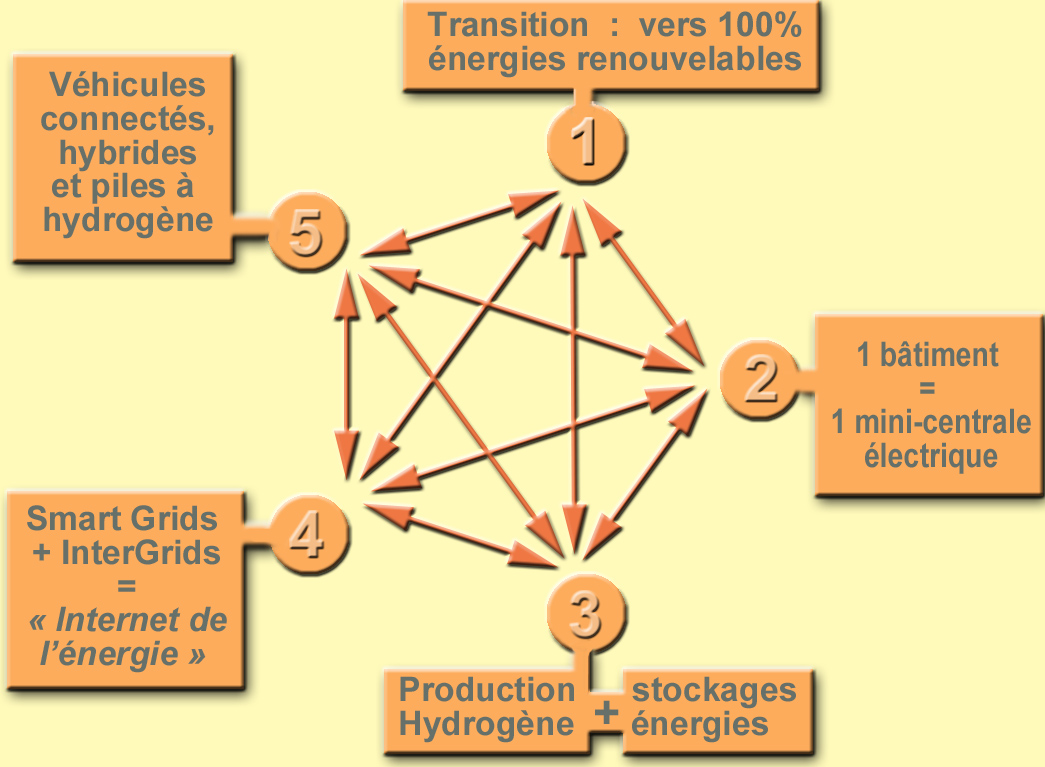 Les 5 piliers nécessaires à la troisième révolution industrielle telle que présentée dans le projet de Jeremy Rifkin. Pour lui ces 5 piliers sont également indispensables et doivent être mis en œuvre ensemble. Un défaillance ou un retard de l'un des piliers empêcherait le développement des autres.